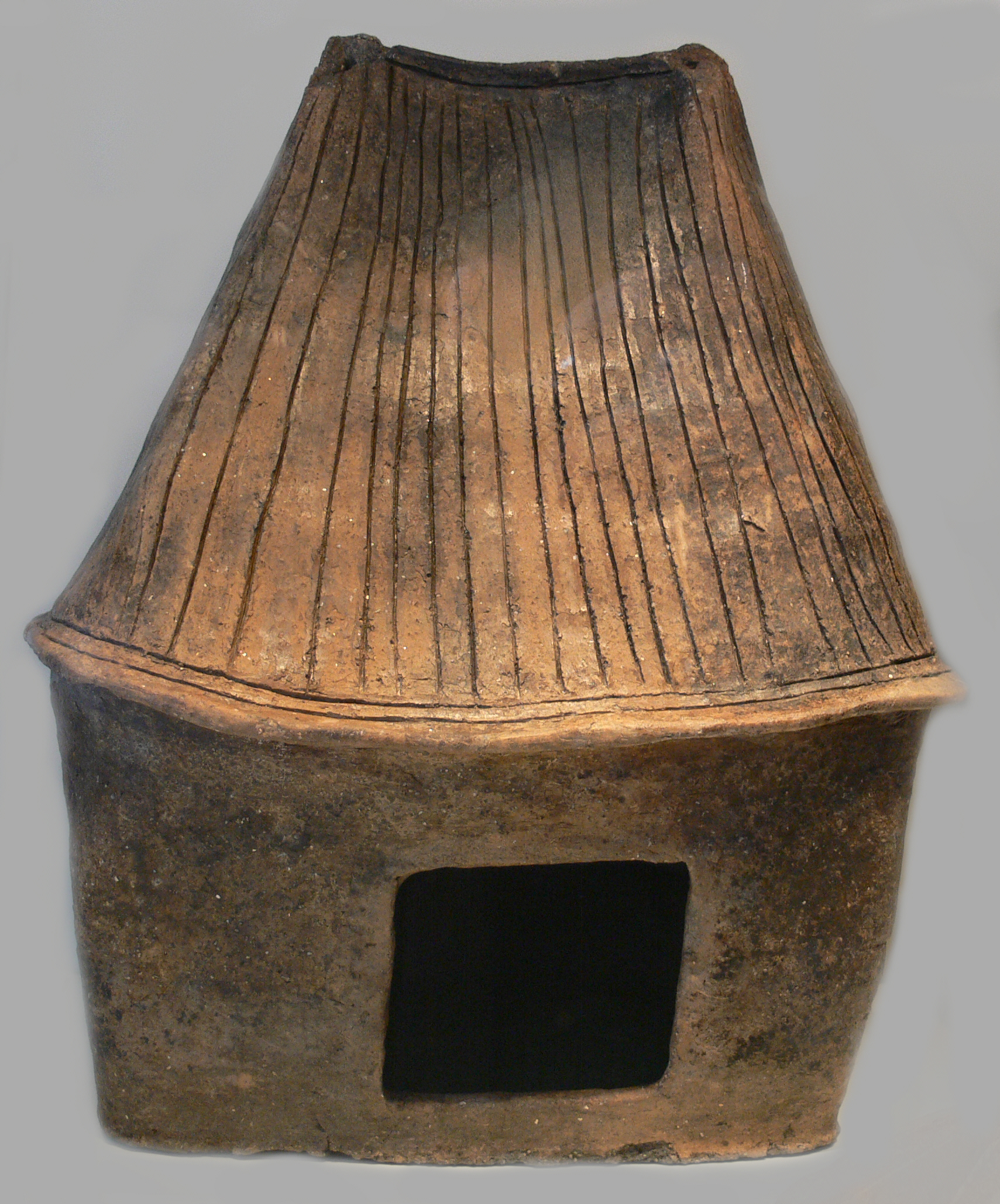 Hausurne mit Firstdach, Keramik; 7. Jh. v. Chr.; Neu Königsaue, Sachsen-Anhalt Collection: Museum für Vor- und Frühgeschichte Berlin